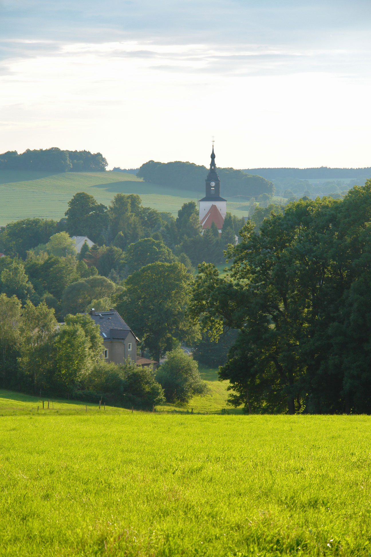 Frankenstein bei Freiberg Sachsen, Deutschland